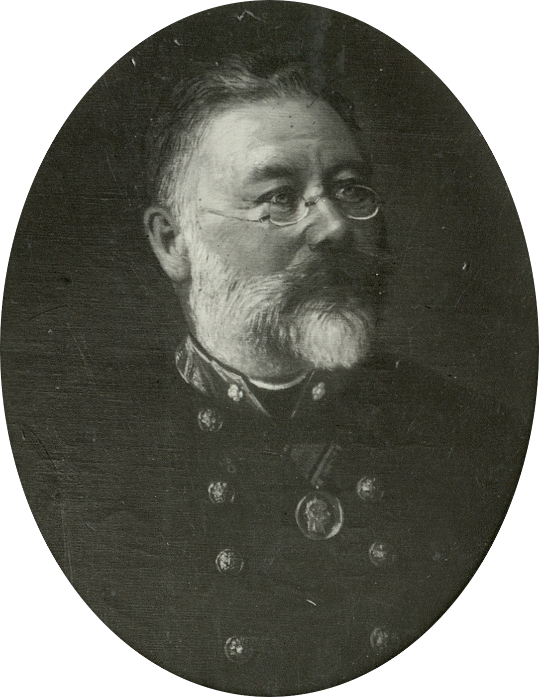 Lovrenc Košir (1804-1879), Slovene inventor.